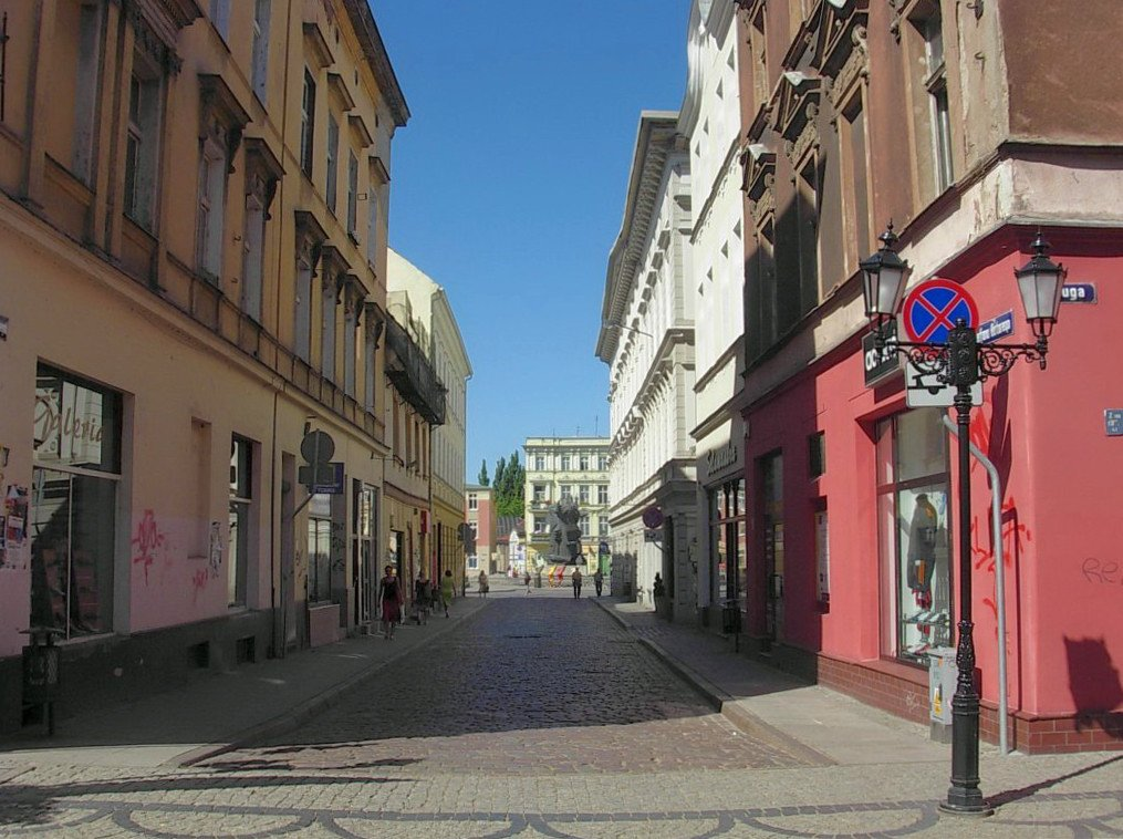 Ulica Stefana Batorego w Bydgoszczy